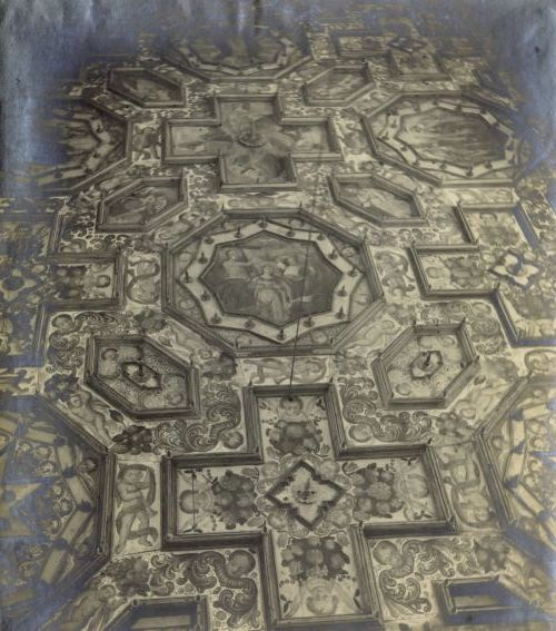 Fotografija kasetiranega stropa v cerkvi sv. Andreja v Gostečah